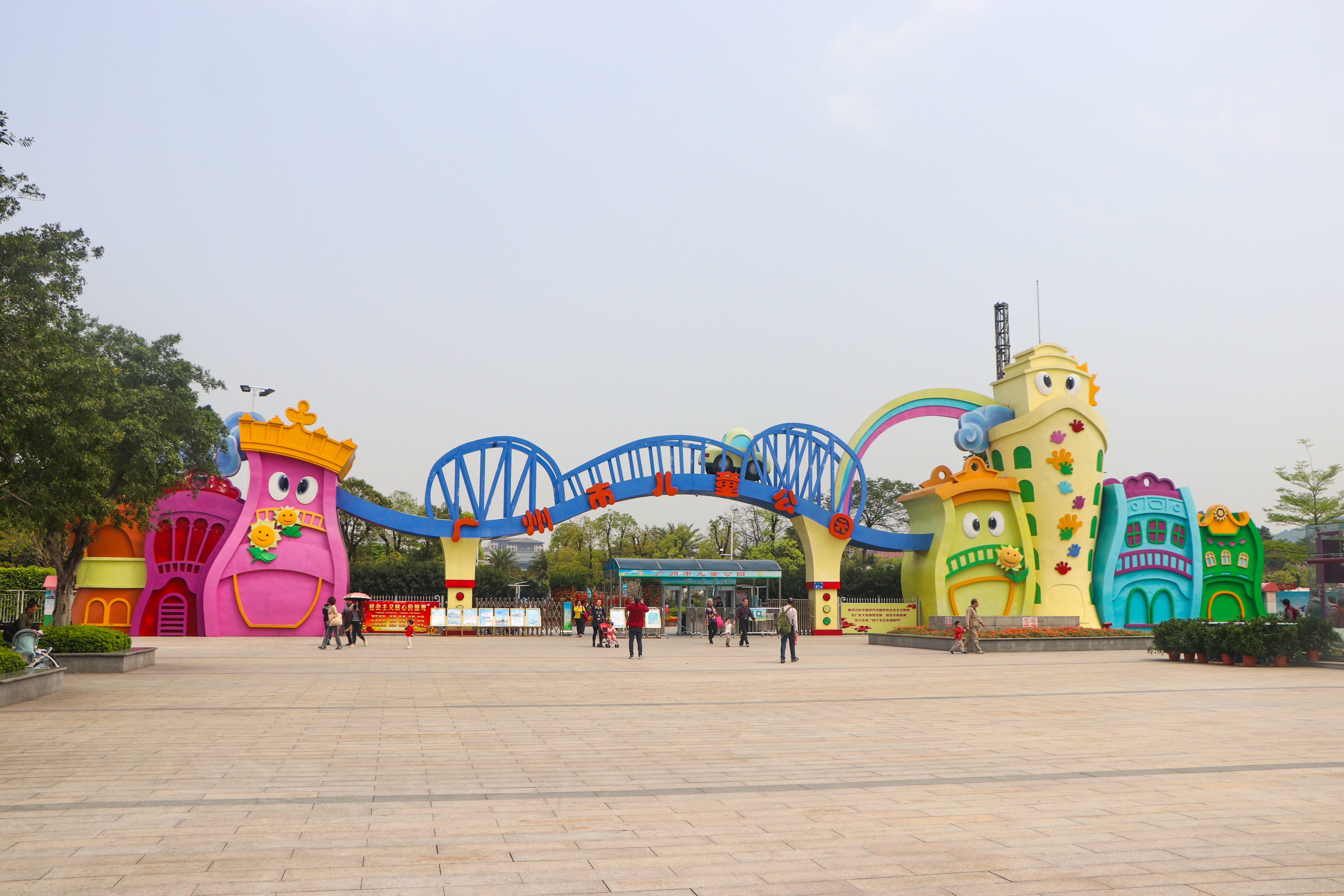 广州市儿童公园